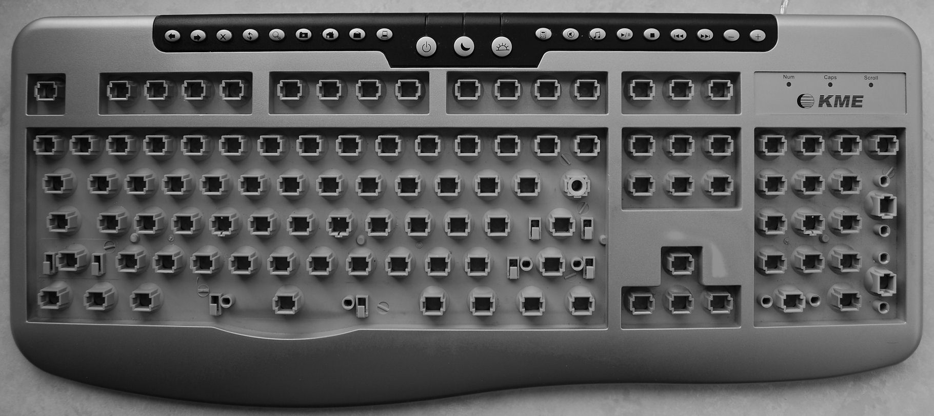 multimediálni klávesnice se sundanými klávesami